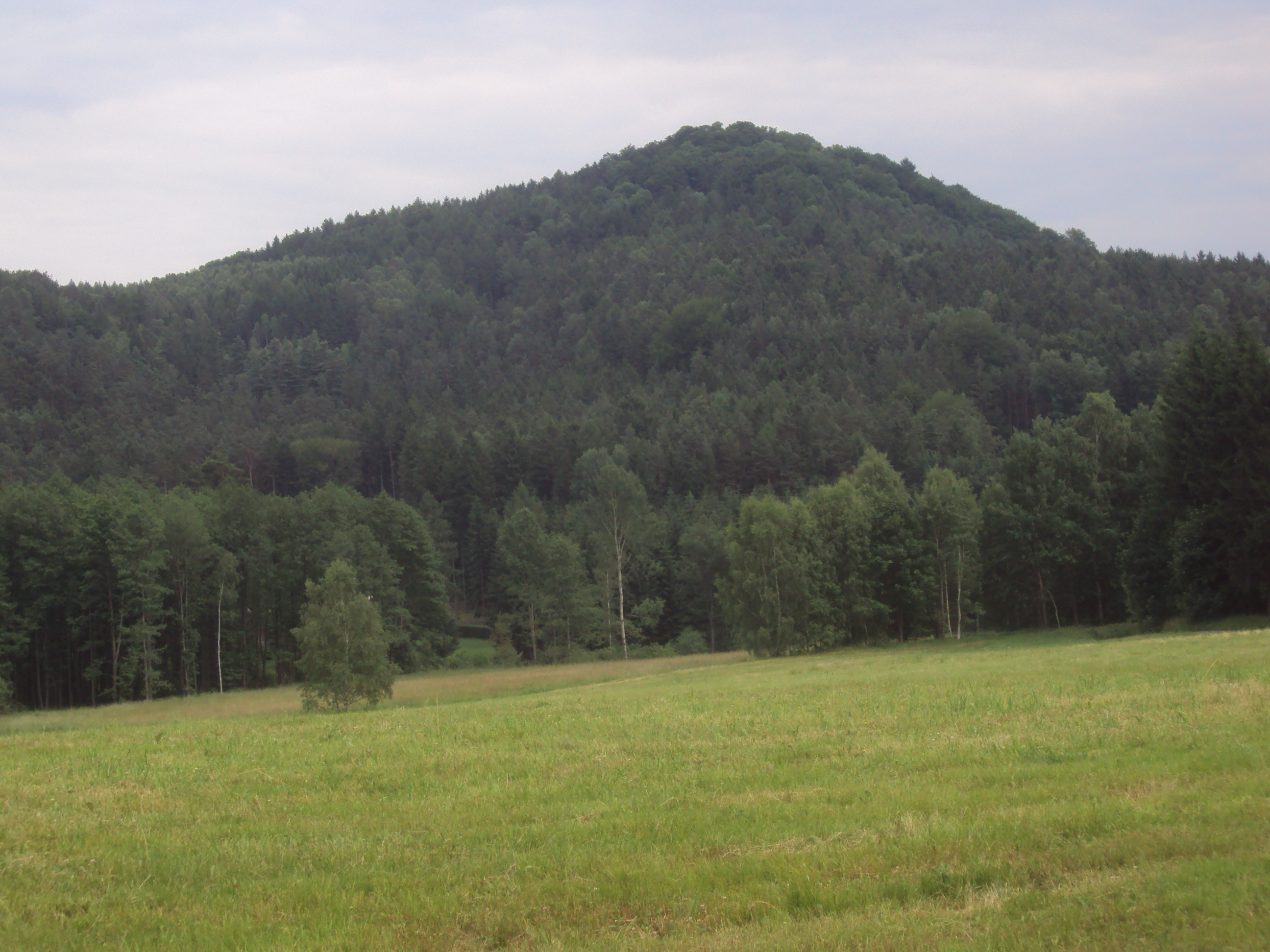 Hrouda je kopec východně od Cvikova 452 m. n.m